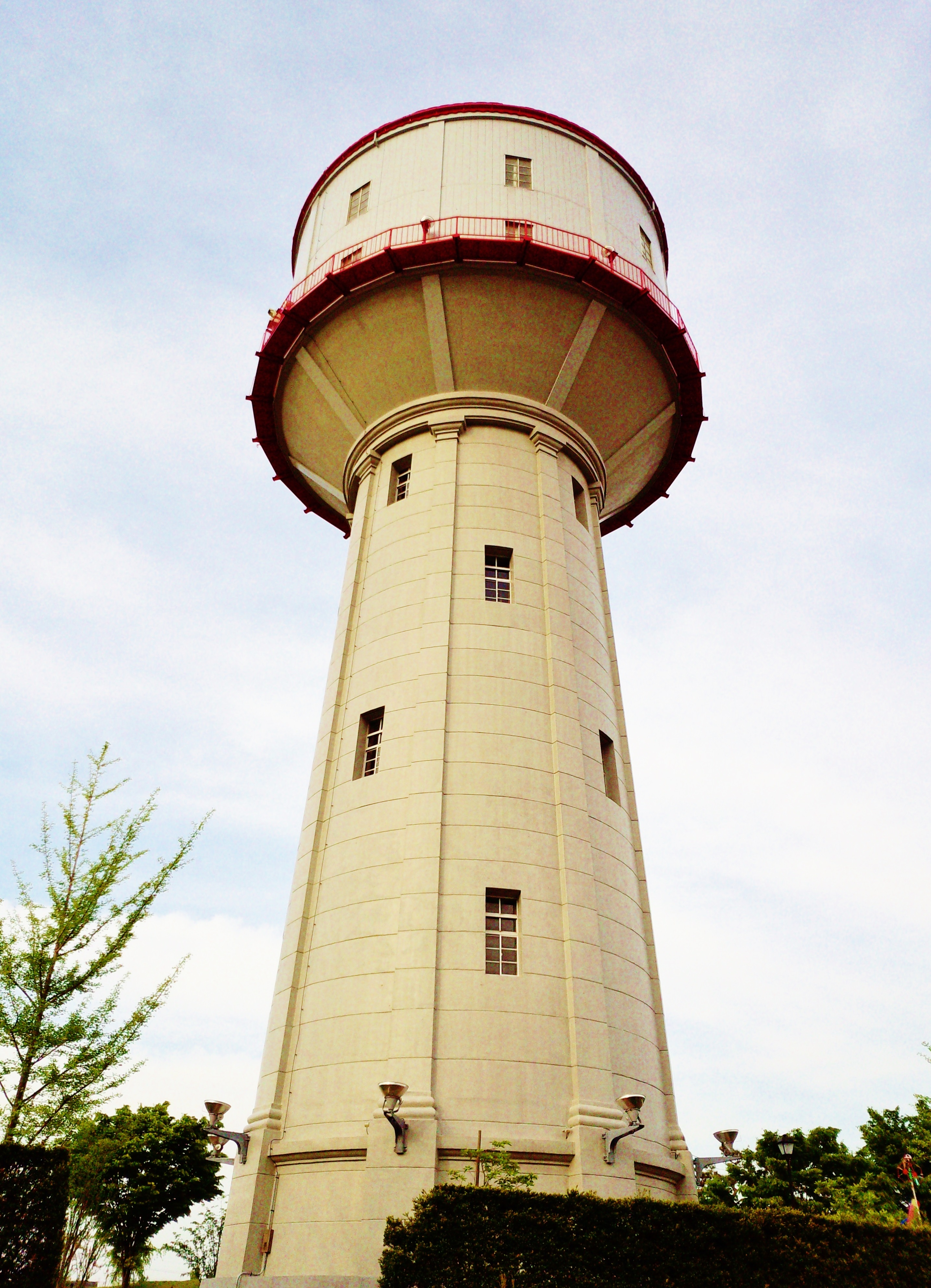 新潟県長岡市の旧水道タンク